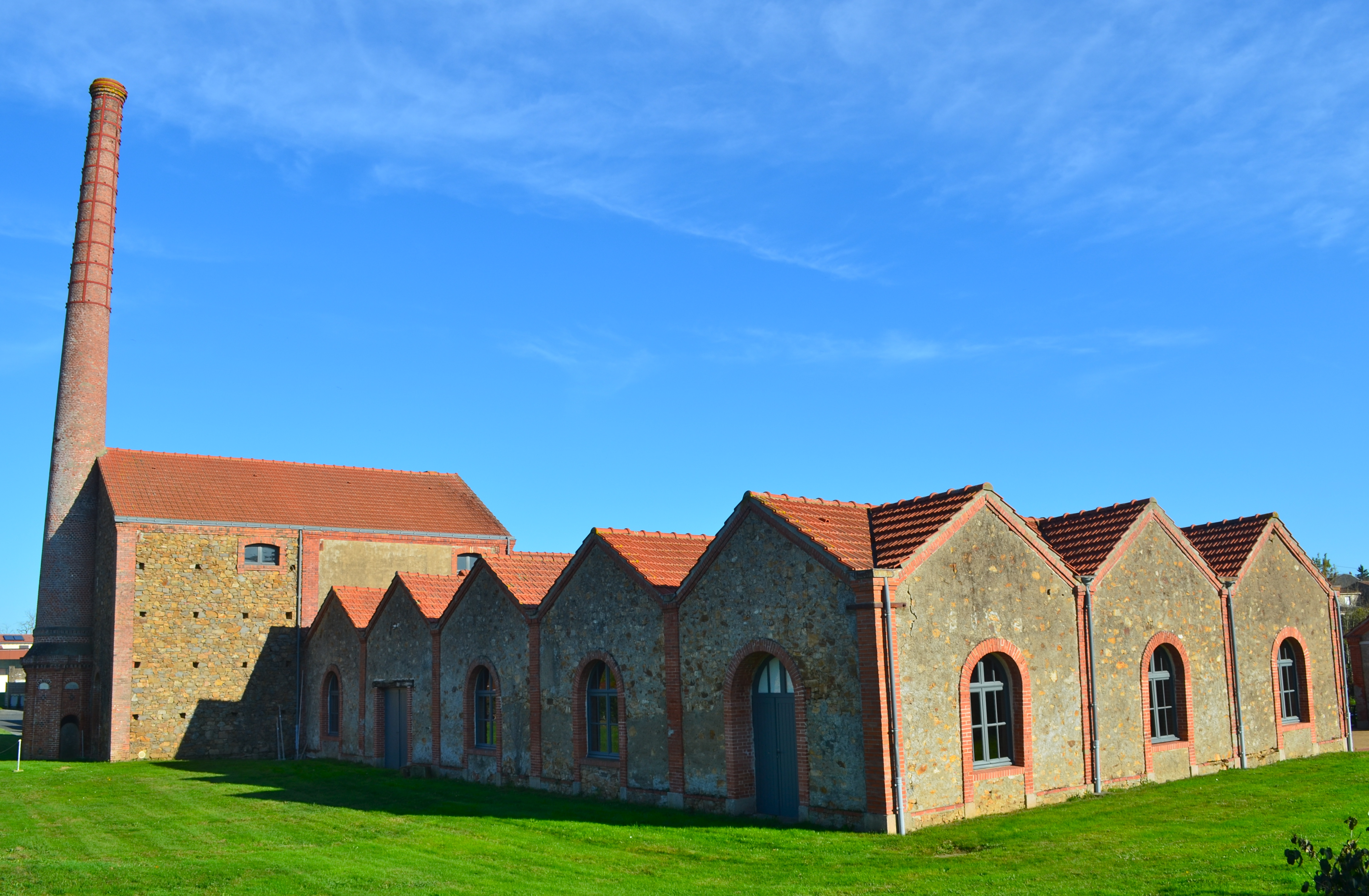 Ancienne blanchisserie, actuel musée du textile - Cholet (Maine-et-Loire)